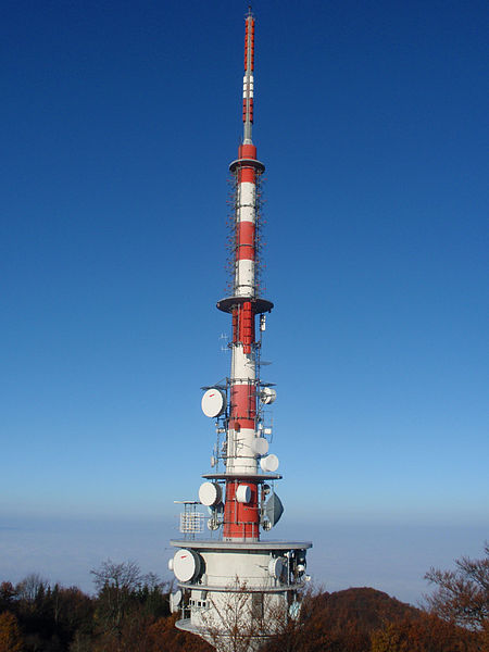 Oddajnik na Trdinovem vrhu